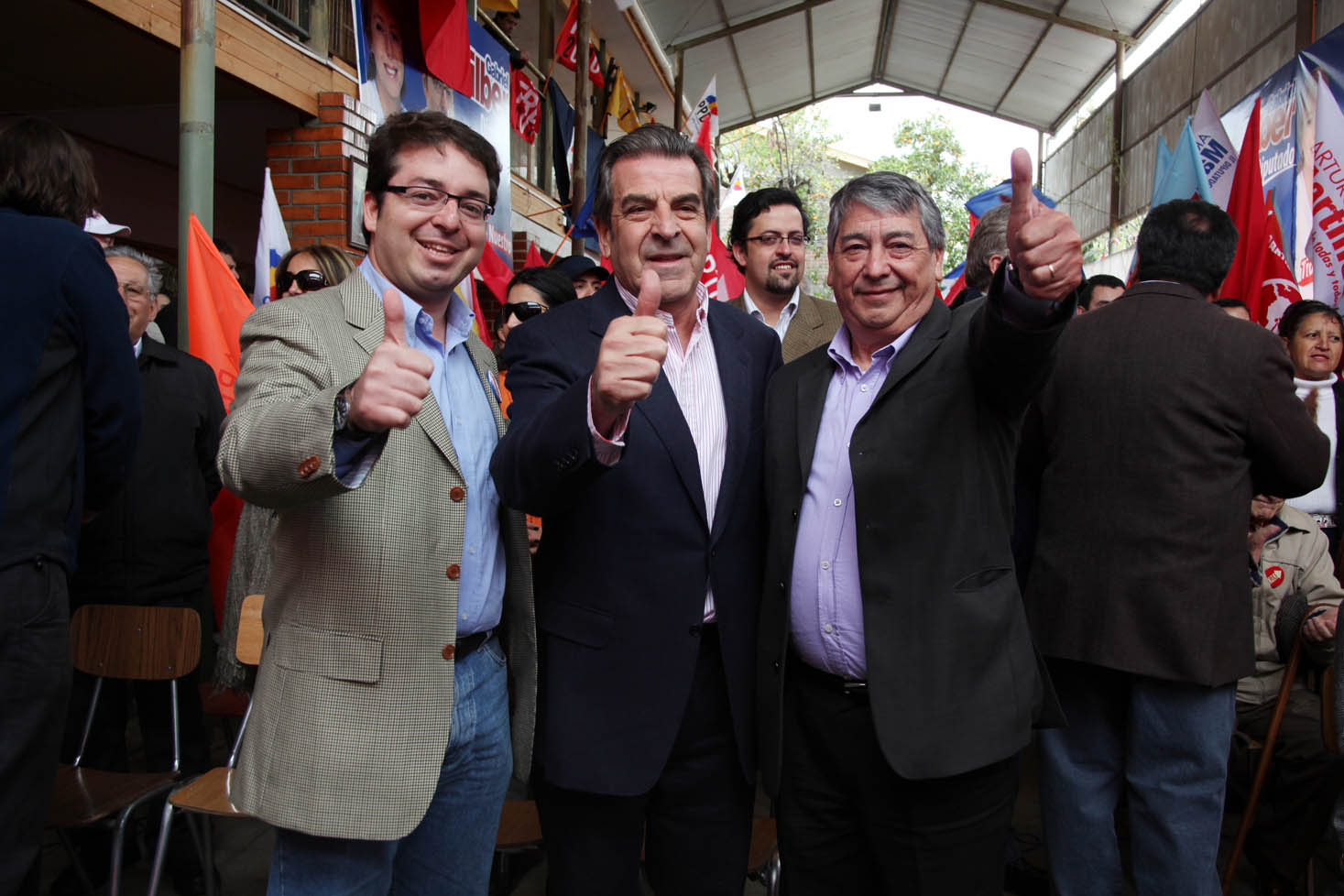 El Senador y candidato presidencial Eduardo Frei Ruiz-Tagle destacó el apoyo de la Iglesia Católica para impulsar una reforma laboral y ratificó que en marzo, tras asumir en La Moneda, enviará un proyecto integral al Parlamento.